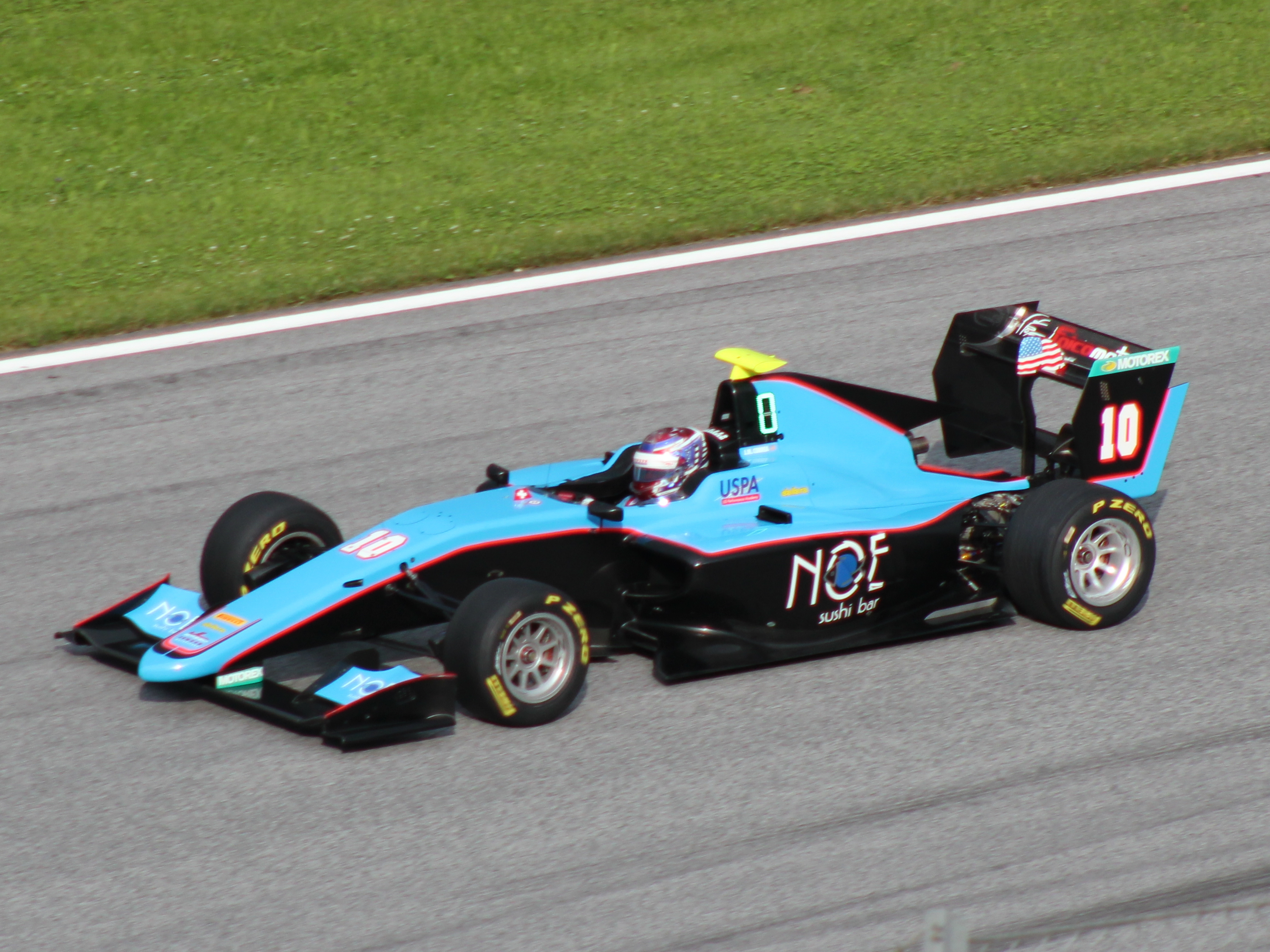 10 Juan Manuel Correa beim Rennwochenende in Österreich 2018